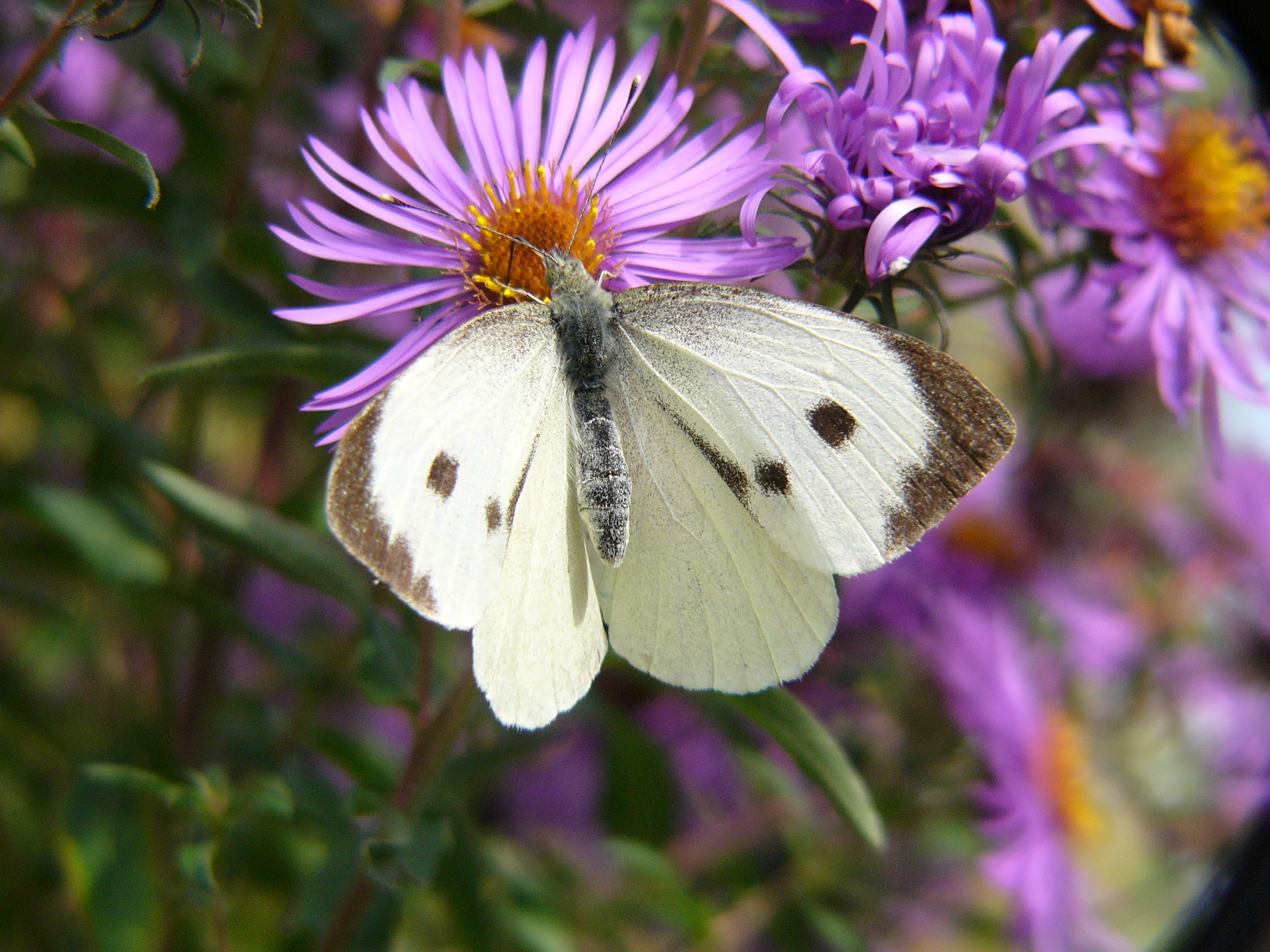 Pieris brassicae